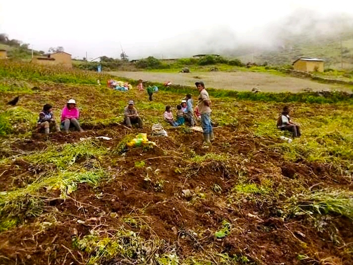 Cosecha de papá en Pampas Grande